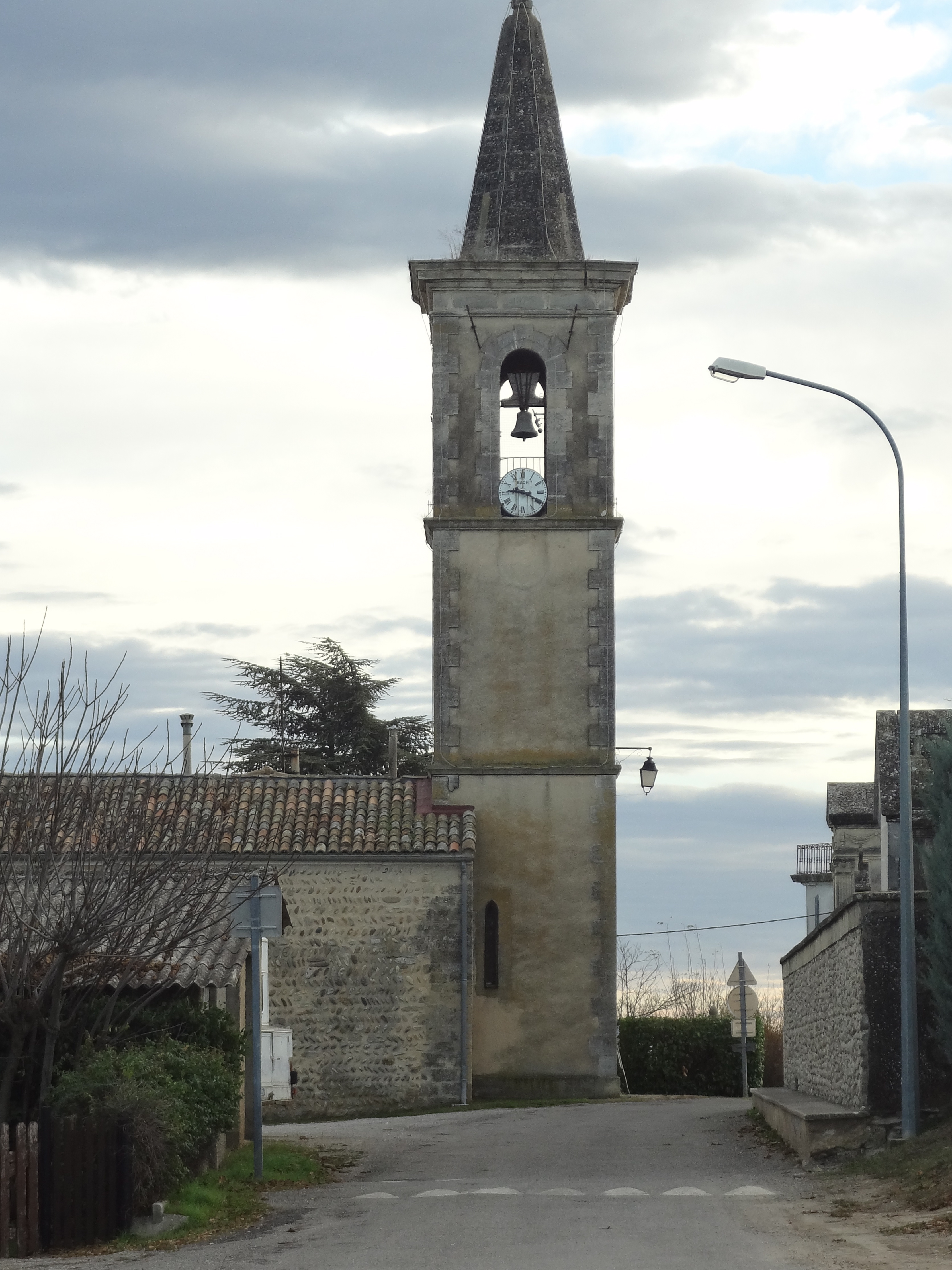 Clocher de l'église Sainte-Agathe de La Brillanne (04).